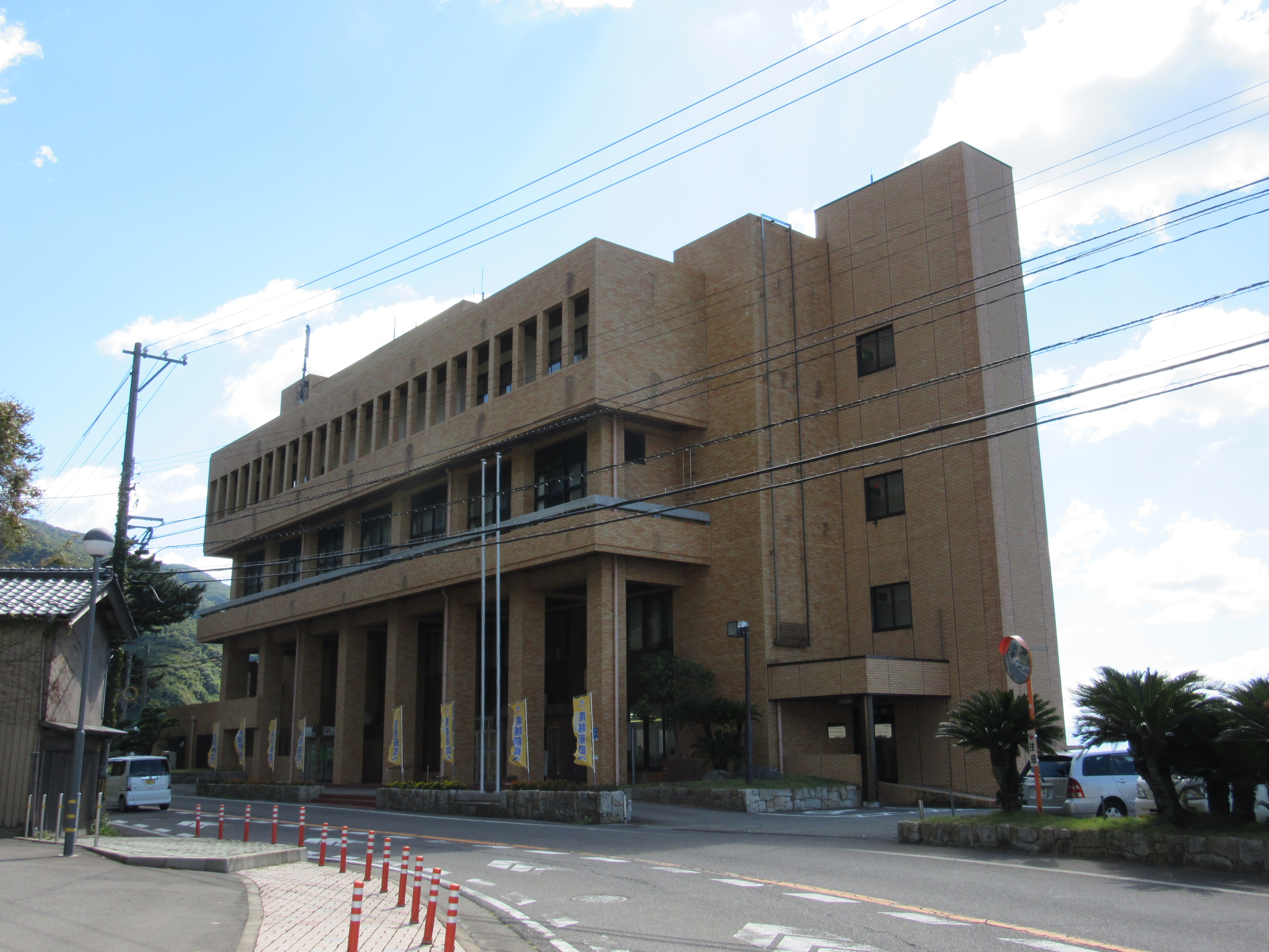 南越前町役場河野総合事務所（旧河野村役場）